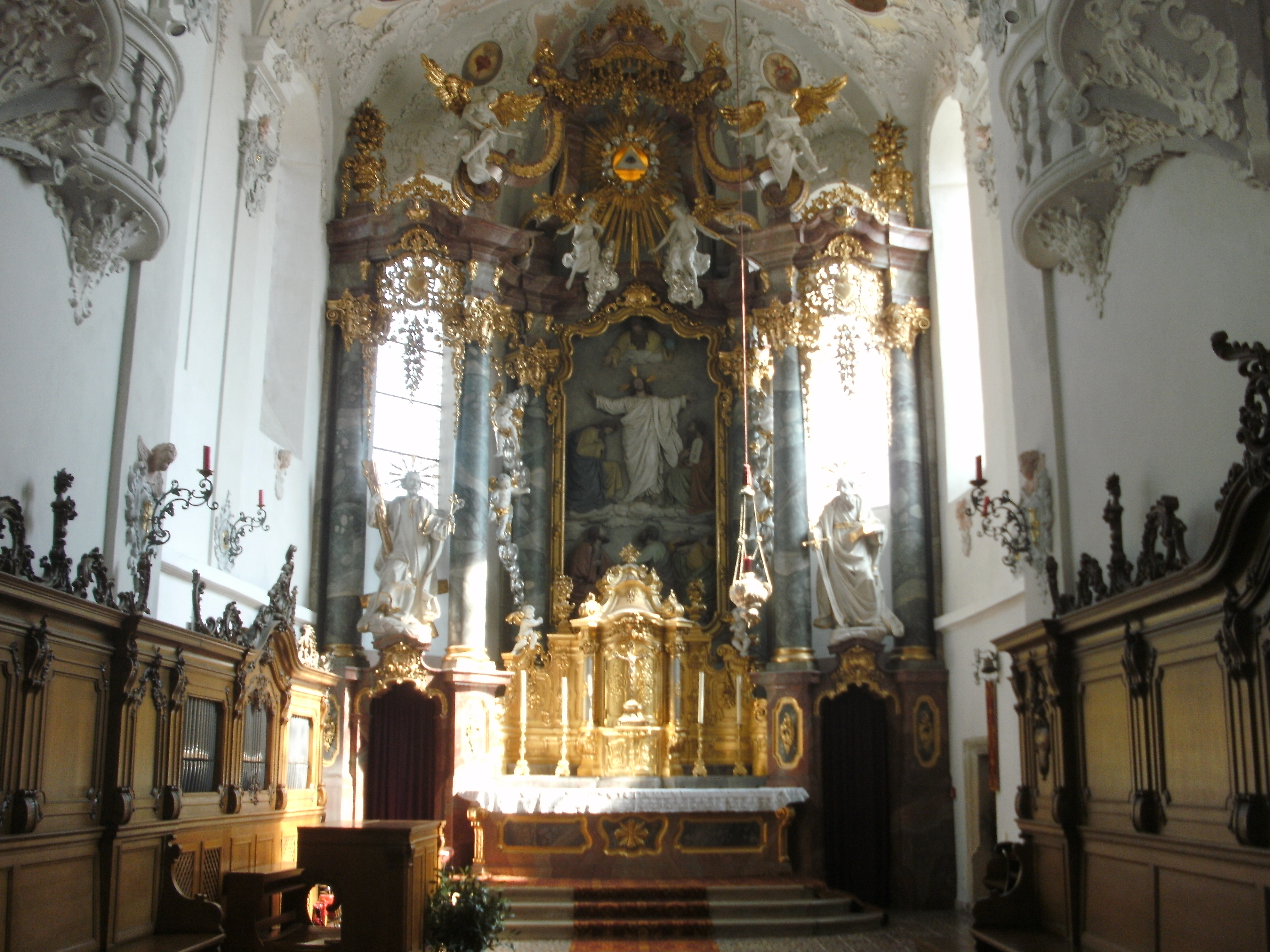 Jakobskirche in Cham